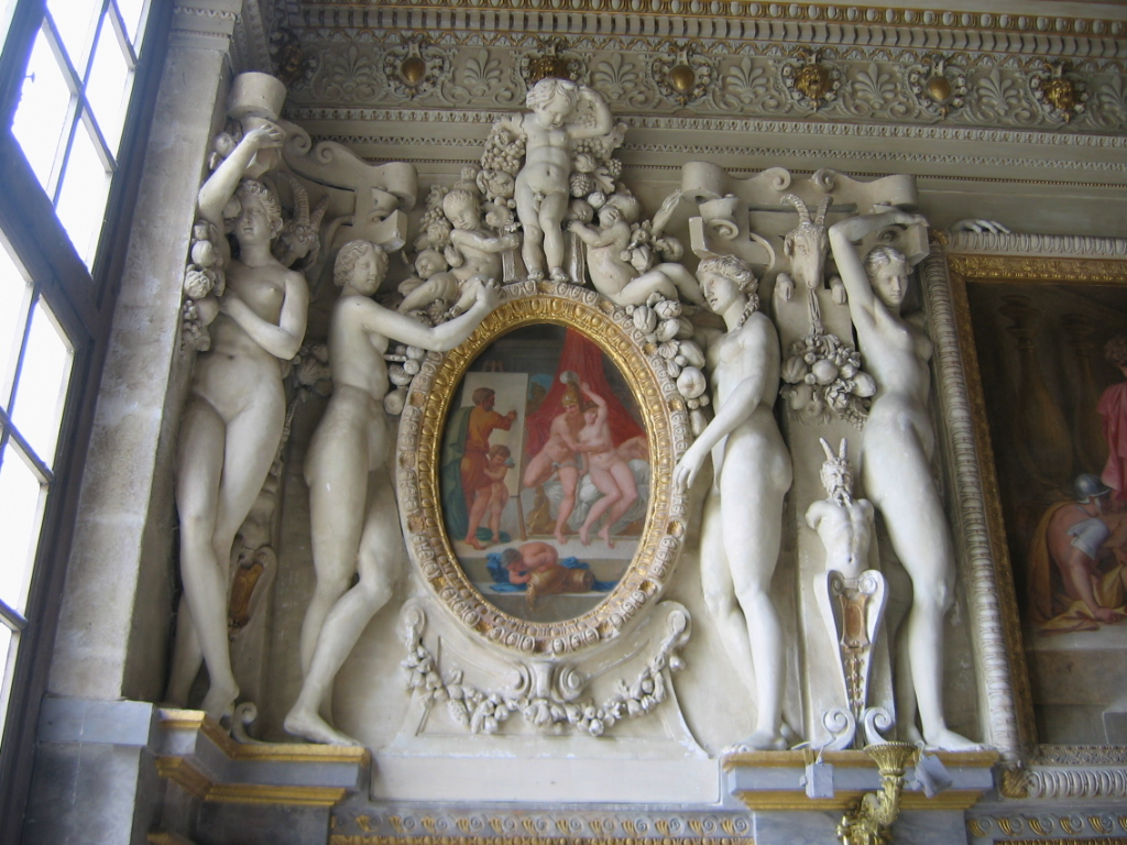 Escalier du roi